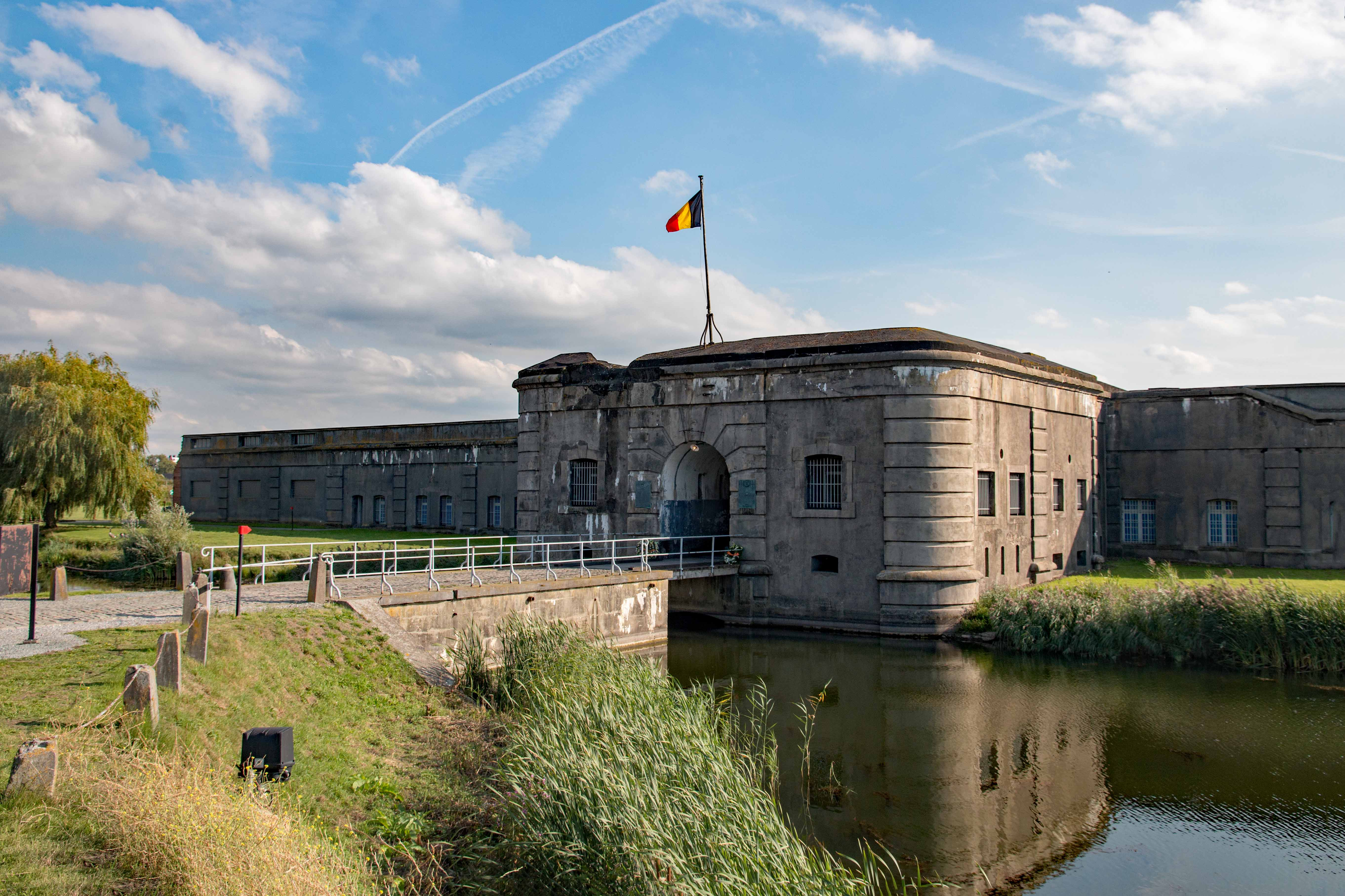 Fort van Breendonk This photo of immovable heritage has been taken in the Flemish Region